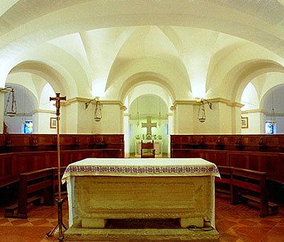 Cripta dell'Abbazia di Santa Maria del Monte.